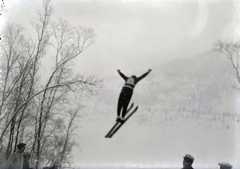 Sverre Salamonsen fra Sulitjelma i svevet på Styrkesnes i Sørfold